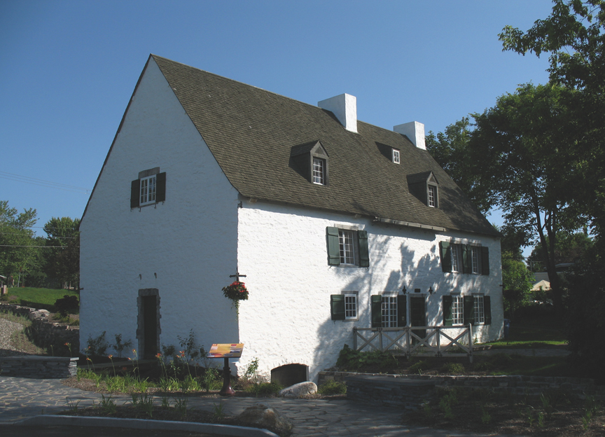 Moulin des Jésuites, Ville de Québec (Québec) Canada. Le Moulin des Jésuites de Charlesbourg est un moulin à eau situé à Québec, à l’est de l'arrondissement historique de Charlesbourg (Trait-Carré). Il a été construit en pierre en 1740 et a cessé de fonctionner en 1940. Il abrite aujourd'hui un centre d'interprétation historique.